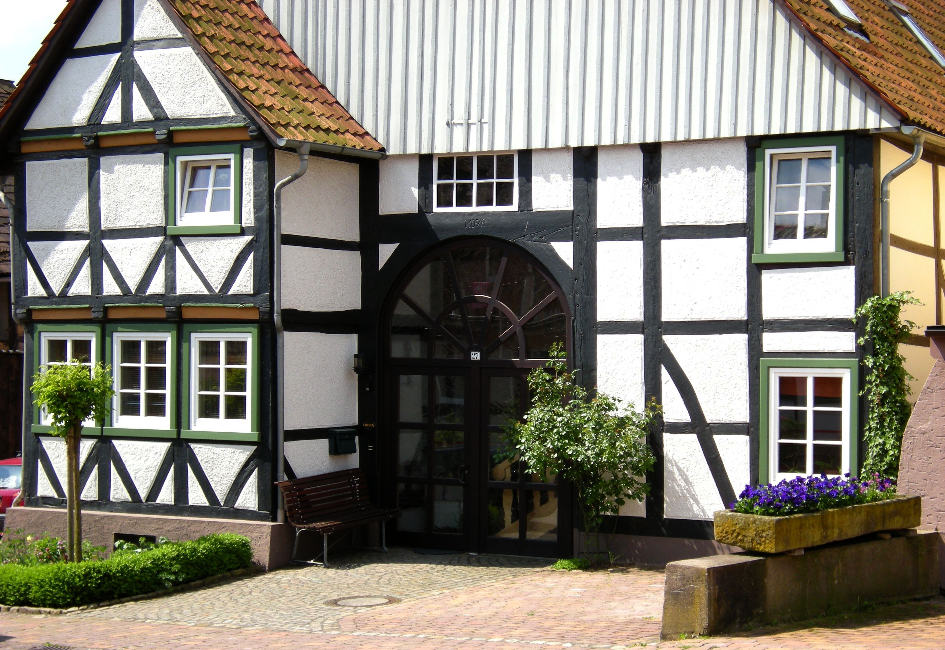 Polle-Fachwerkhaus.jpg